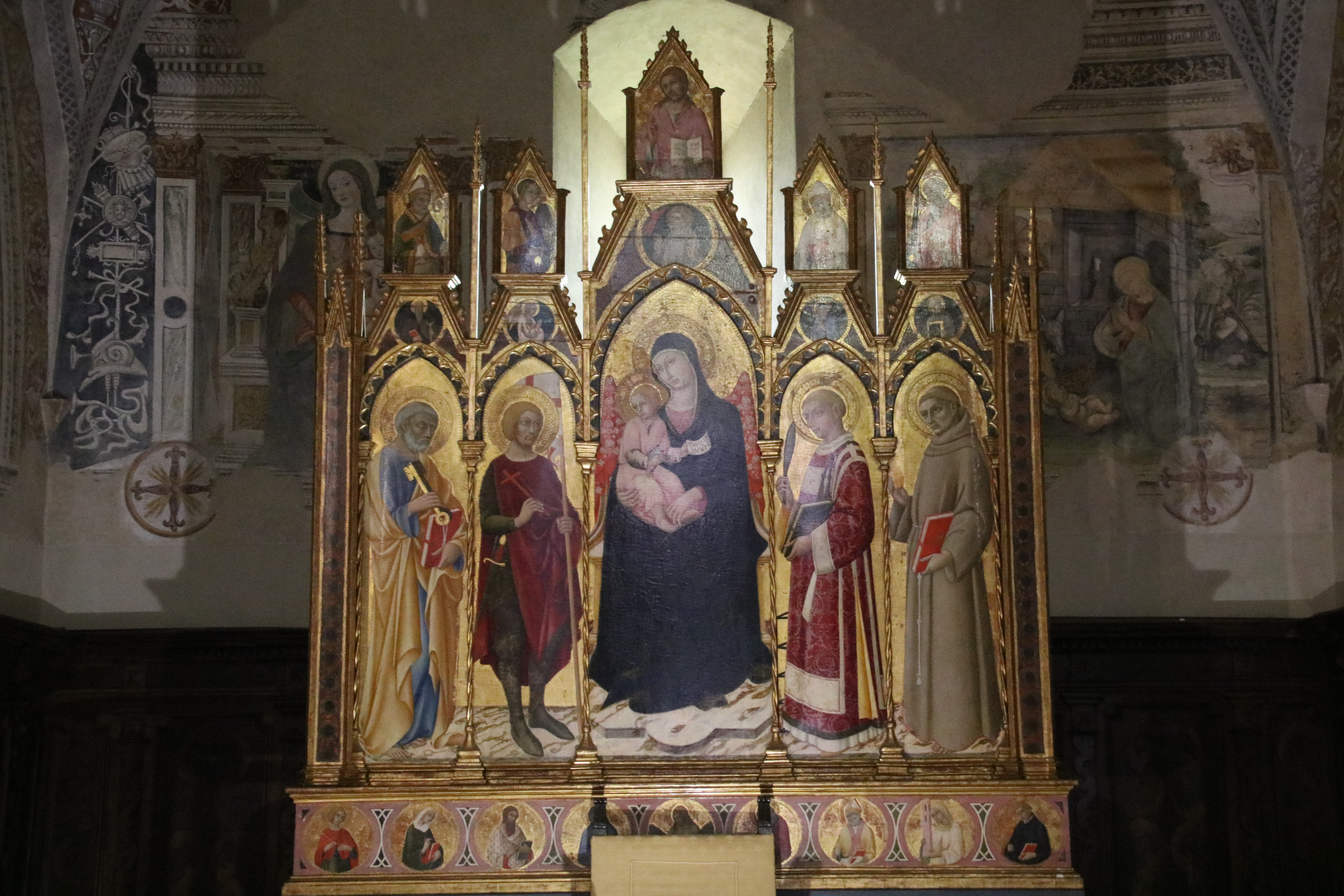 Sano di Pietro, Polittico, 1458, chiesa di San Giorgio (Montemerano)